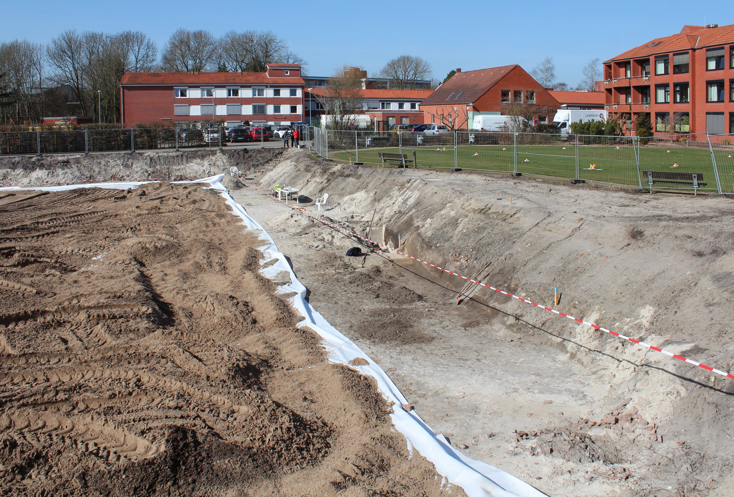 Ausgrabungsgelände der ehemaligen Fockenburg in Leer/Ostfriesland. Randstreifen der Baustelle während der Untersuchung durch die Ostfriesische Landschaft.